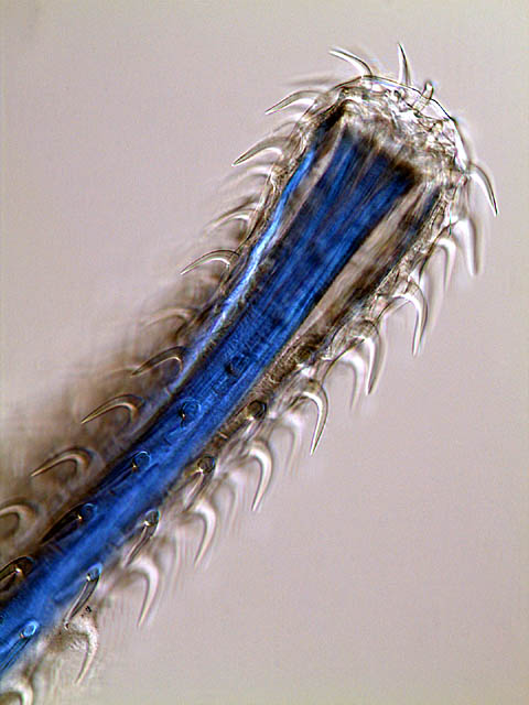 Rhadinorhynchus